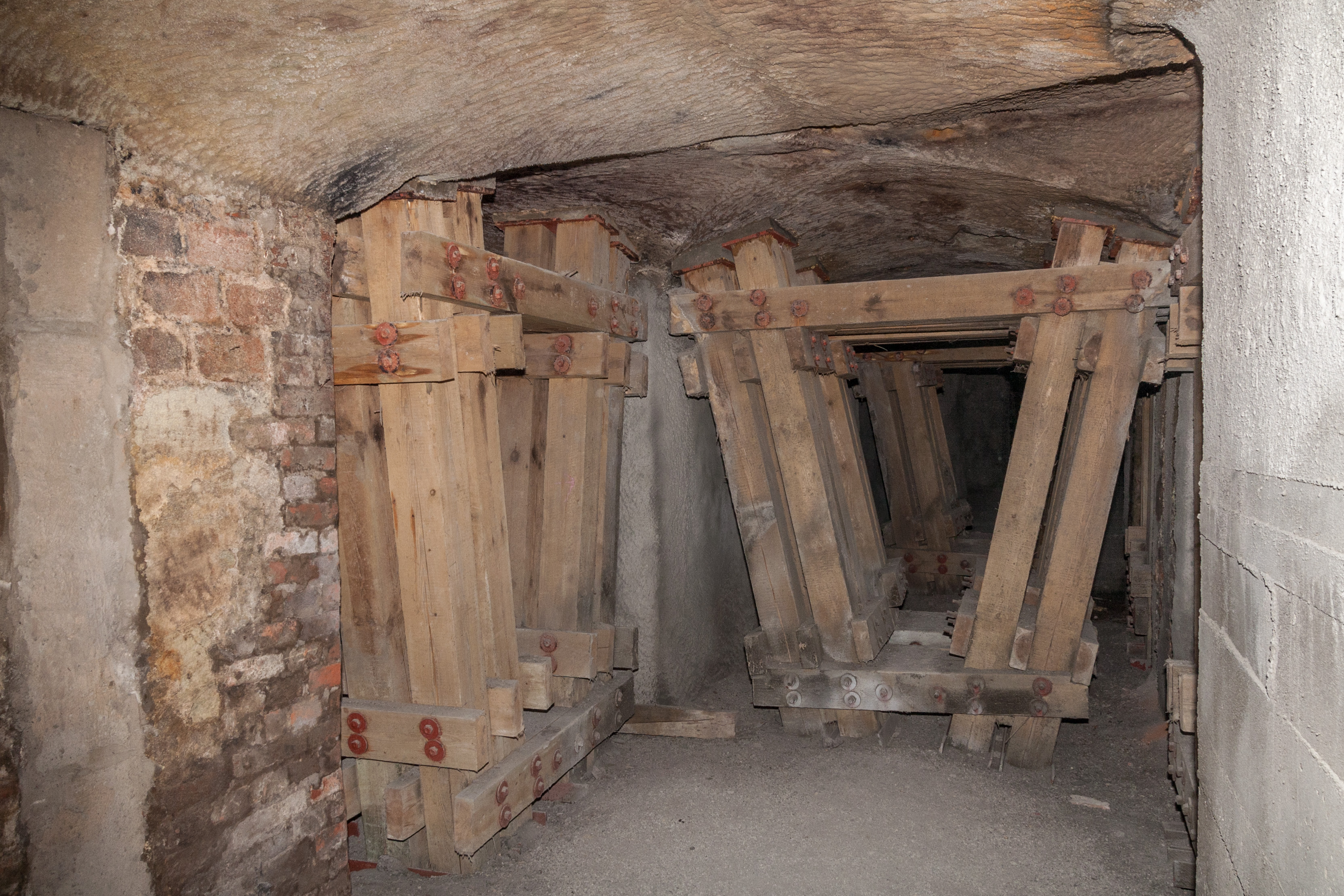 Paniersbunker, Holzstützen